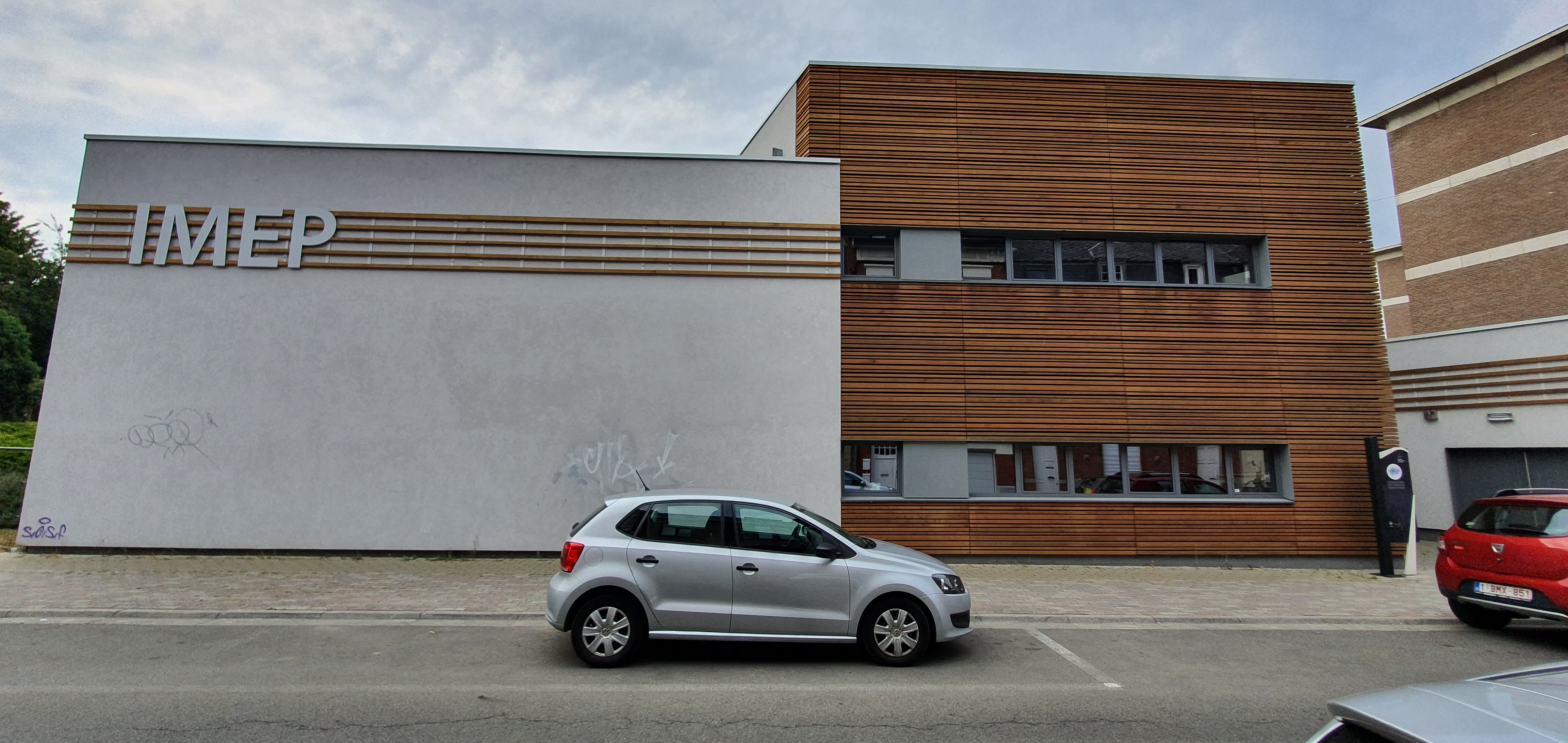 institut supérieure de musique